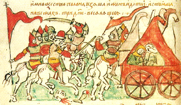 1185-1186. Напад русів на половецьке кочів'я (мініатюра з Радзивілівського літопису): срѣтoша ихъ, дружины своея не дождавше, и съступишася обои, и побѣжени бывше Половцы, и биша ихъ до вежъ, множество полона взяша, женъ и дѣтей